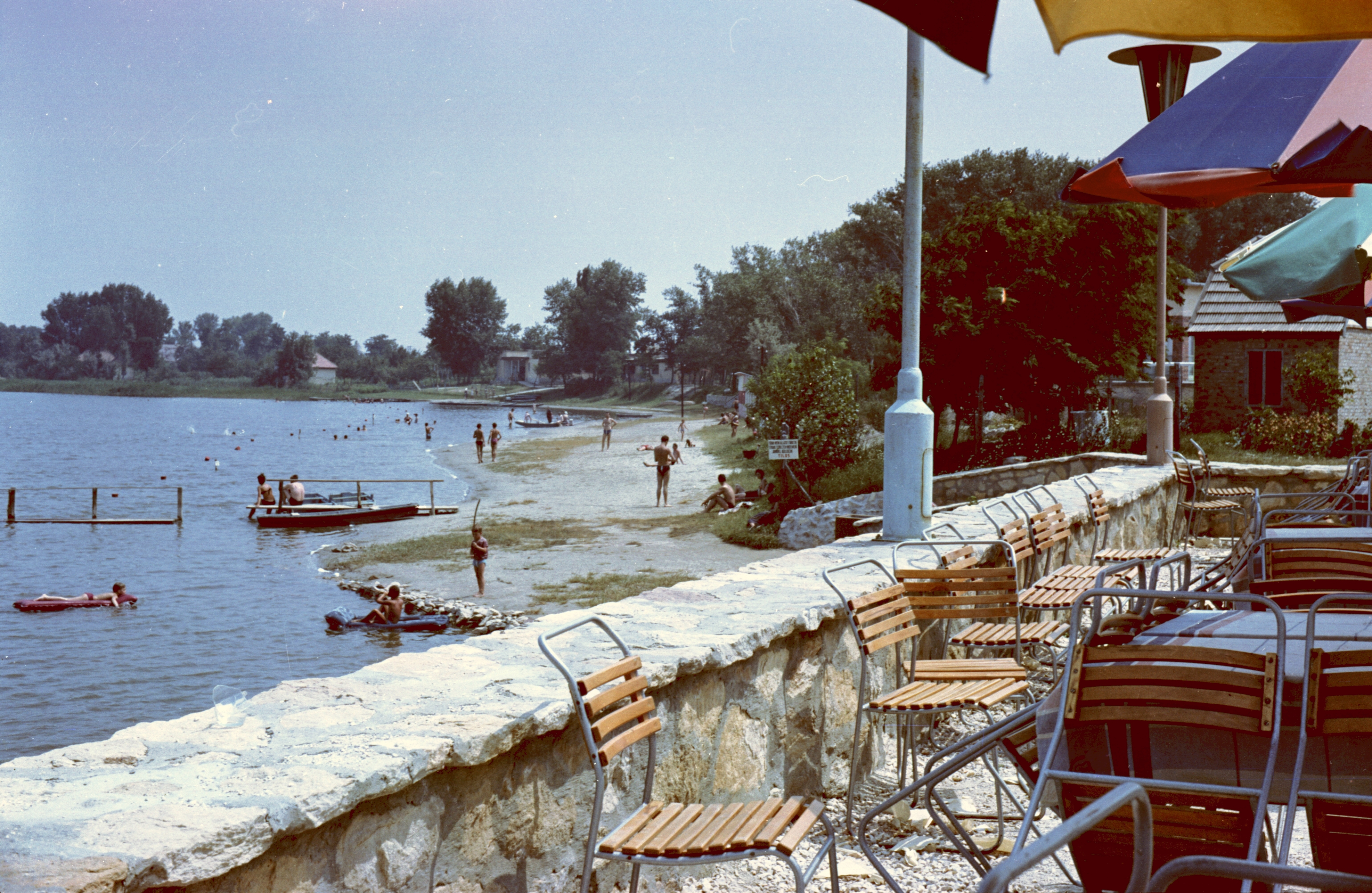 a Tó vendéglő teraszáról nézve. Location: Hungary Tags: beach, colorful, chair Title: a Tó vendéglő teraszáról nézve.